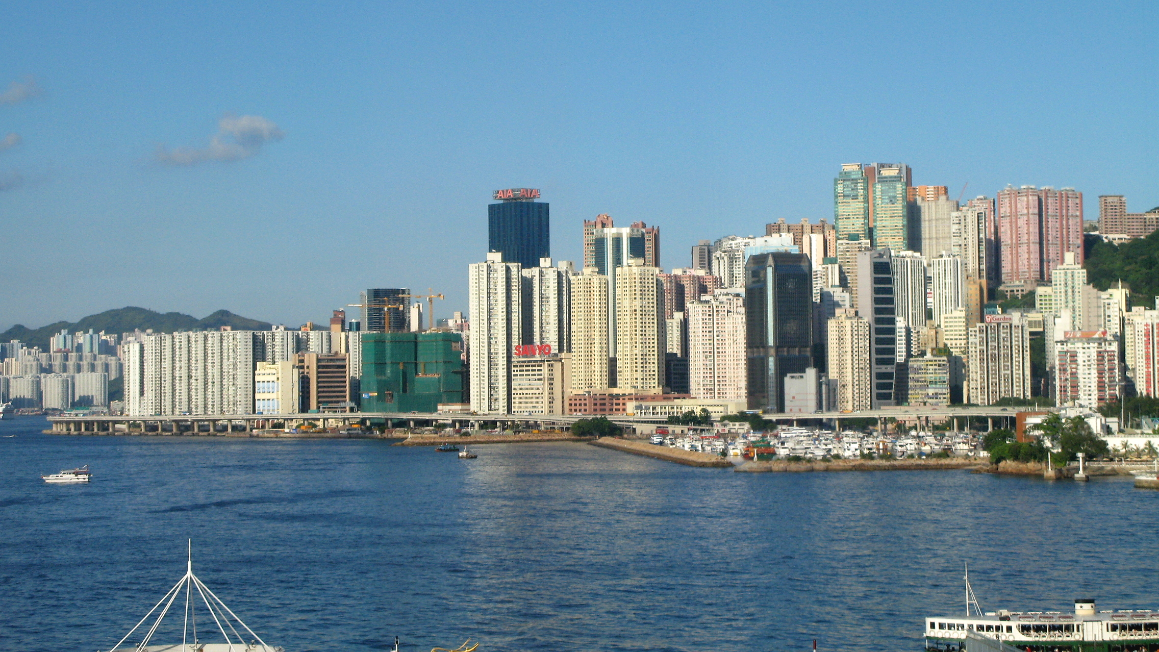 天后 Tin Hau